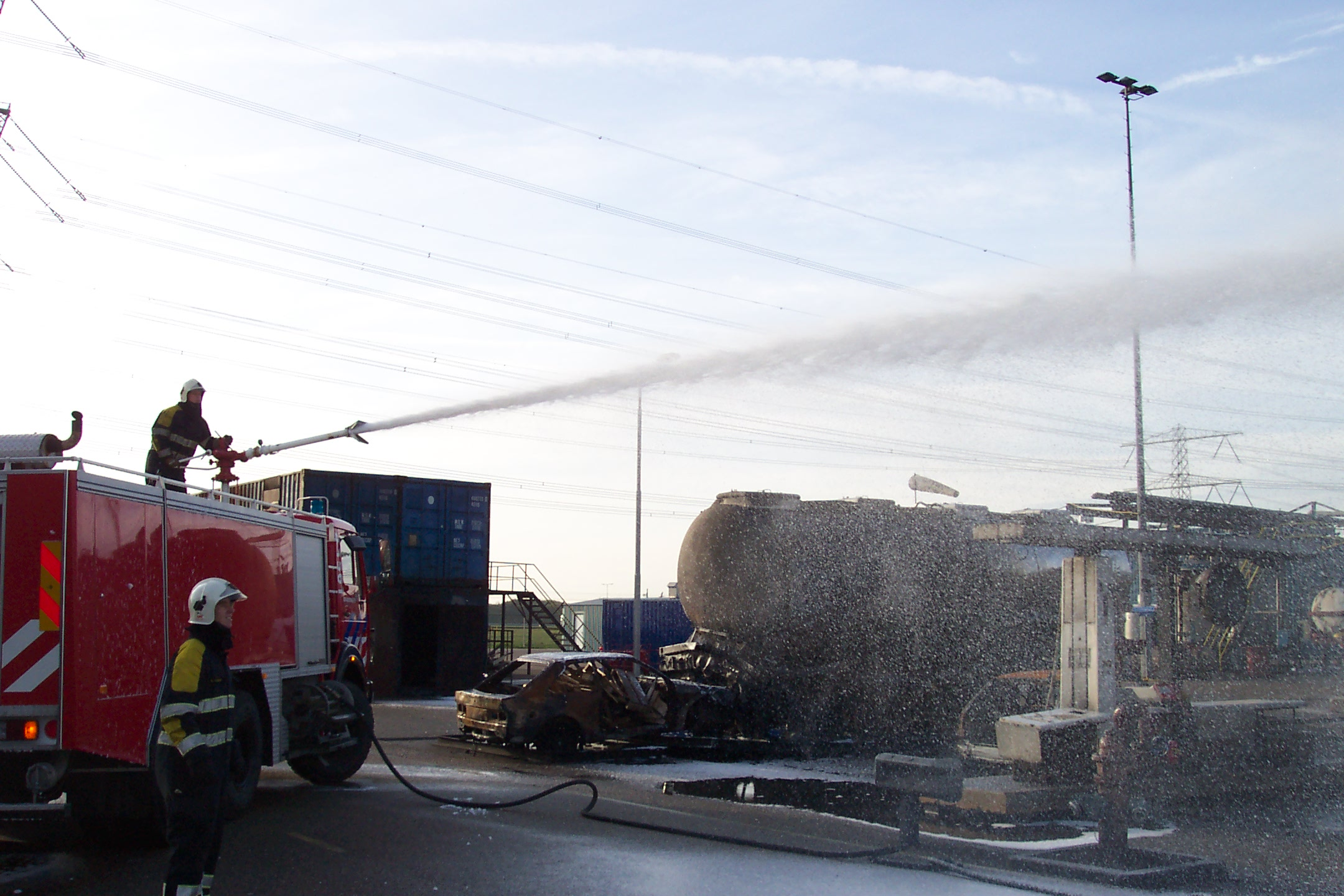 Schuimblusvoertuig/Foam Truck during exercise